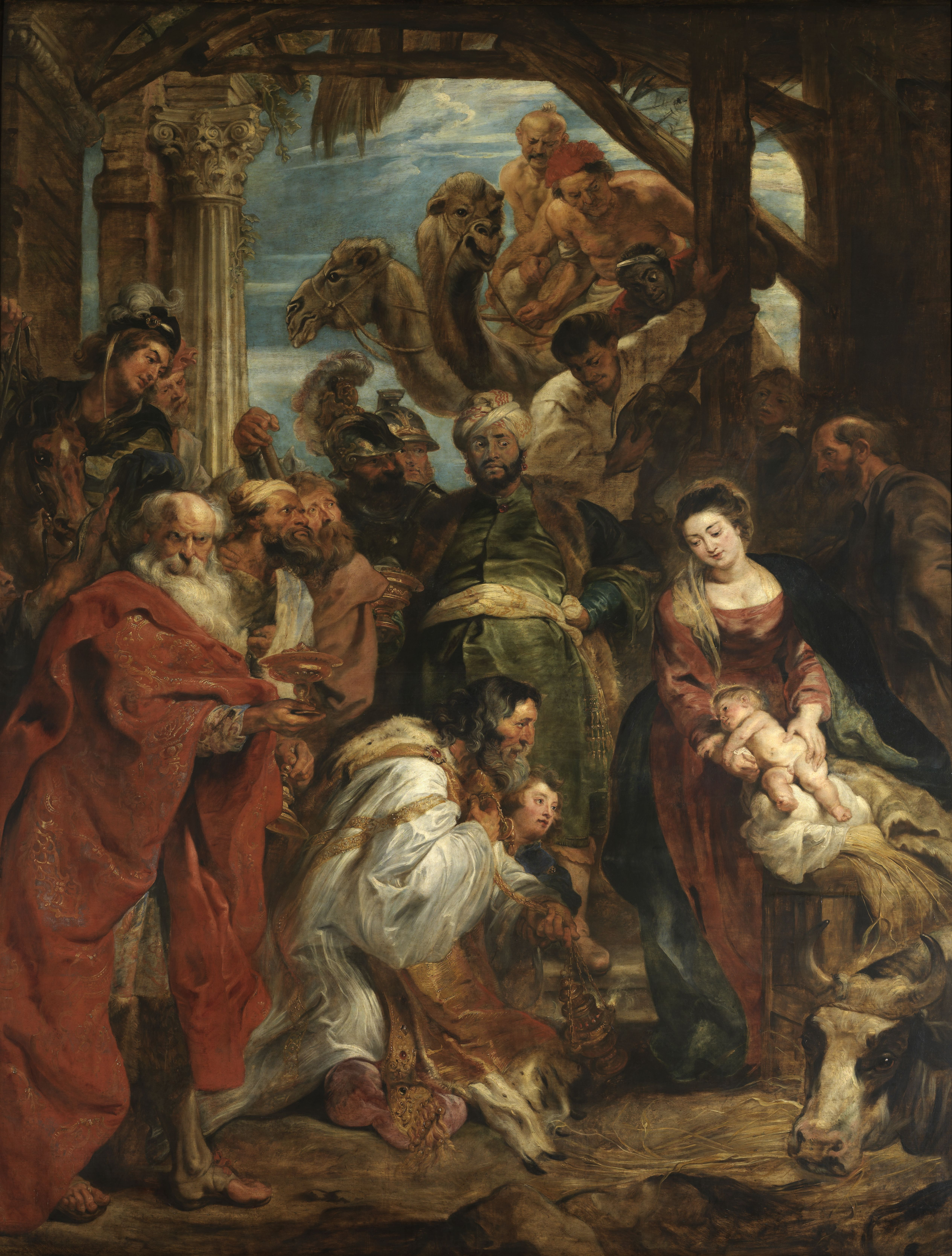 schilderij ( Peter Paul Rubens( koninklijk museum voor schone kunsten antwerpen